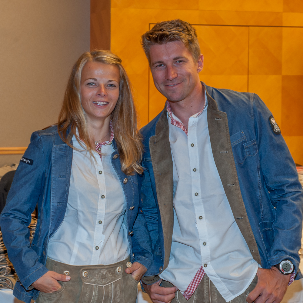 Einkleidung der Österreichischen Teilnehmer an den Olympischen Sommerspielen 2016 am 16./17. Juli 2016 in Wien. Bild zeigt Tanja Frank und Thomas Zajac.